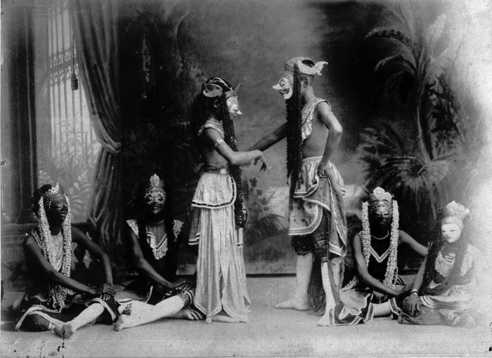 Foto. Wajang topeng voorstelling